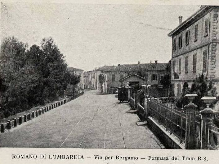 Romano di Lombardia, la fermata del tram Bergamo-Soncino